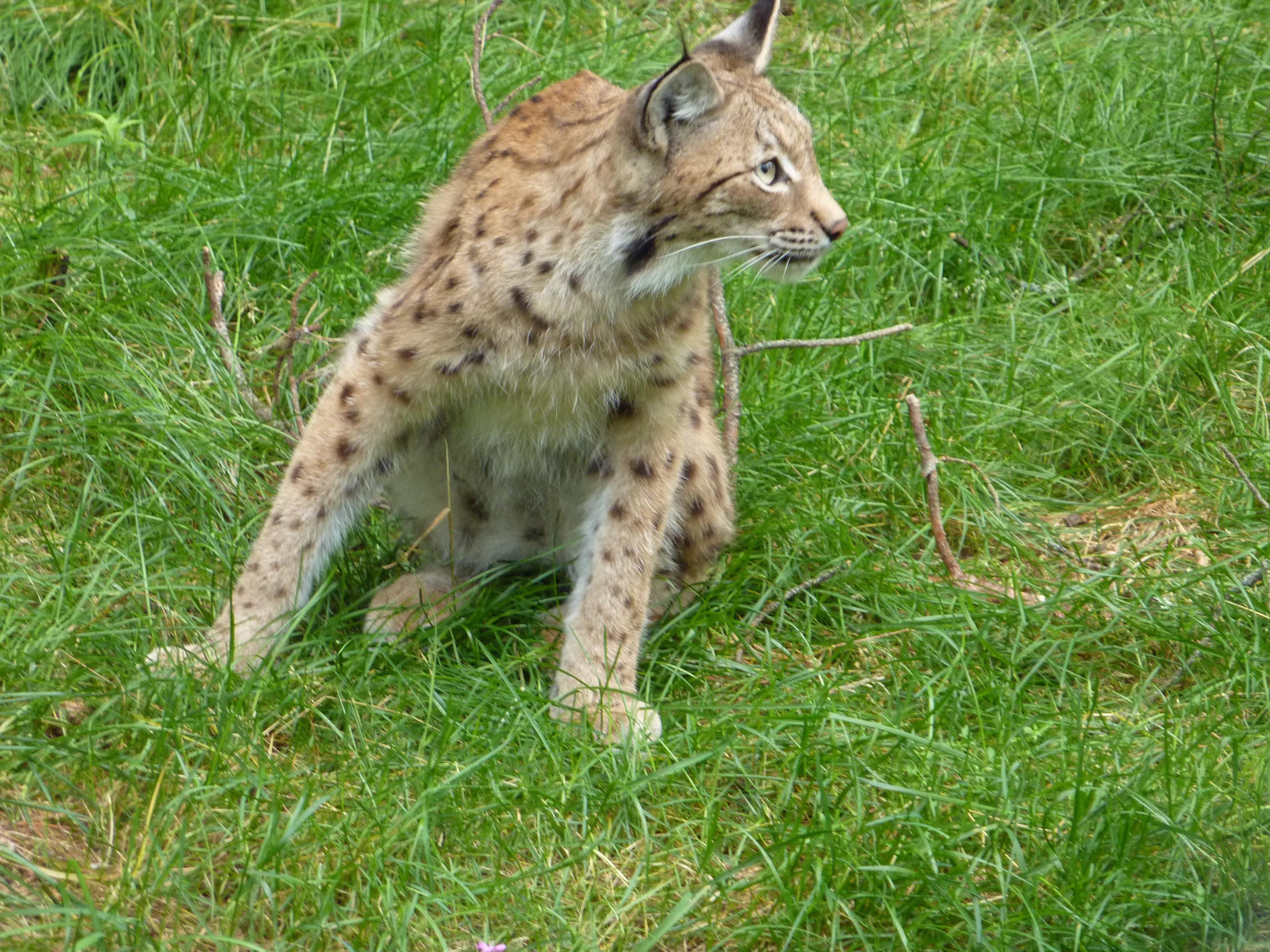 Gaupe, Ilves, Kuusamo 2013